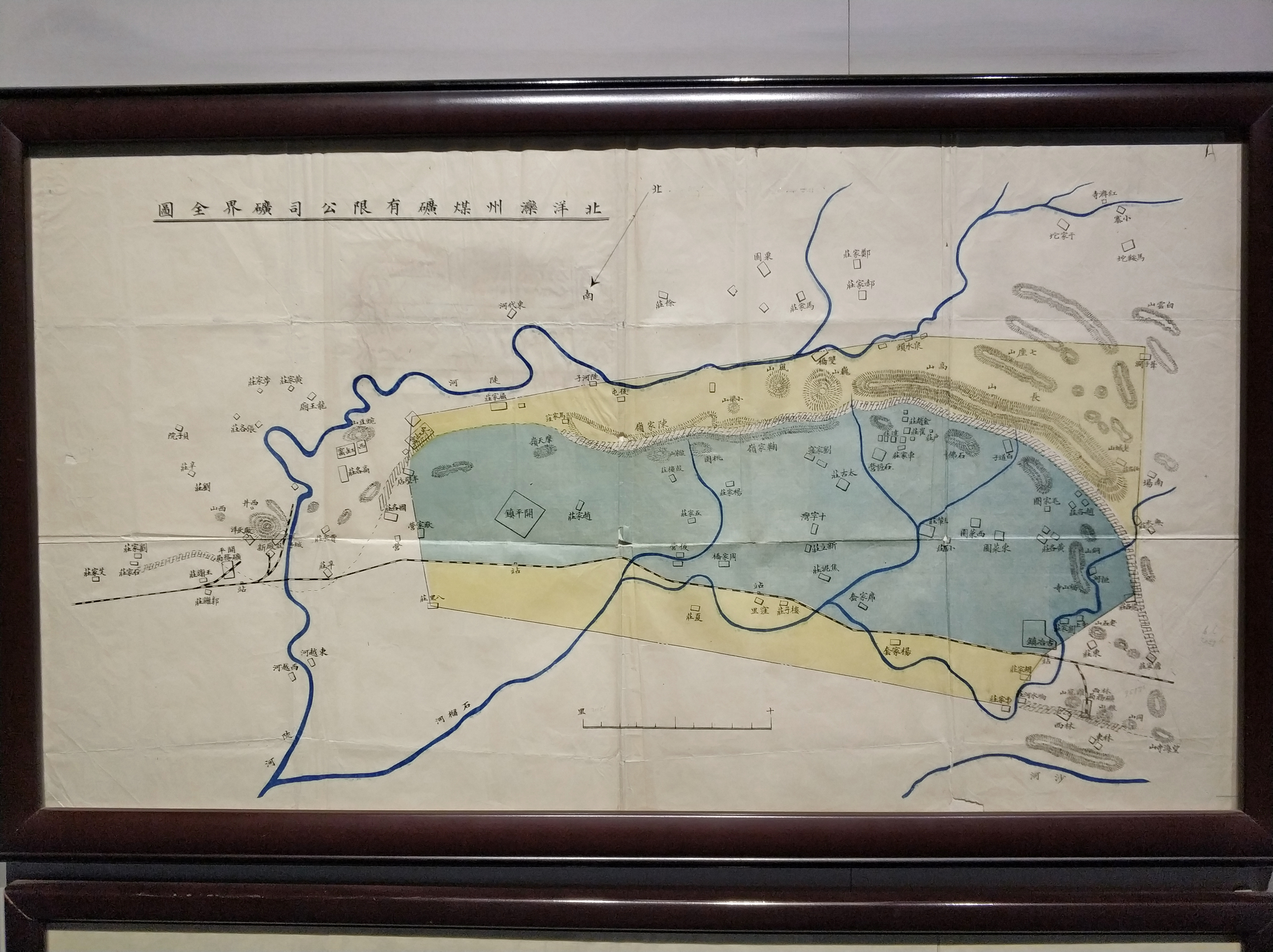 中文（中国大陆）: 唐山开滦国家矿山公园开滦博物馆展览